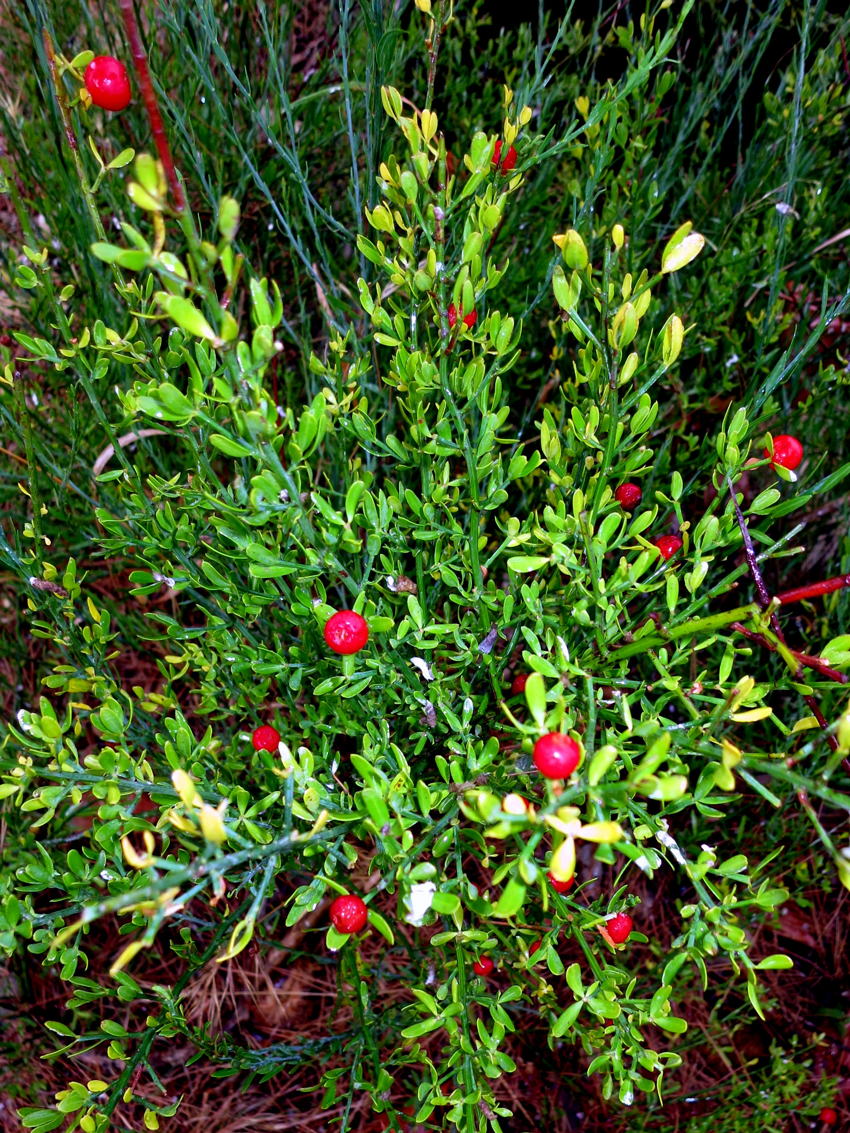 Guardalobo o Retama loca. Bajo Aragón